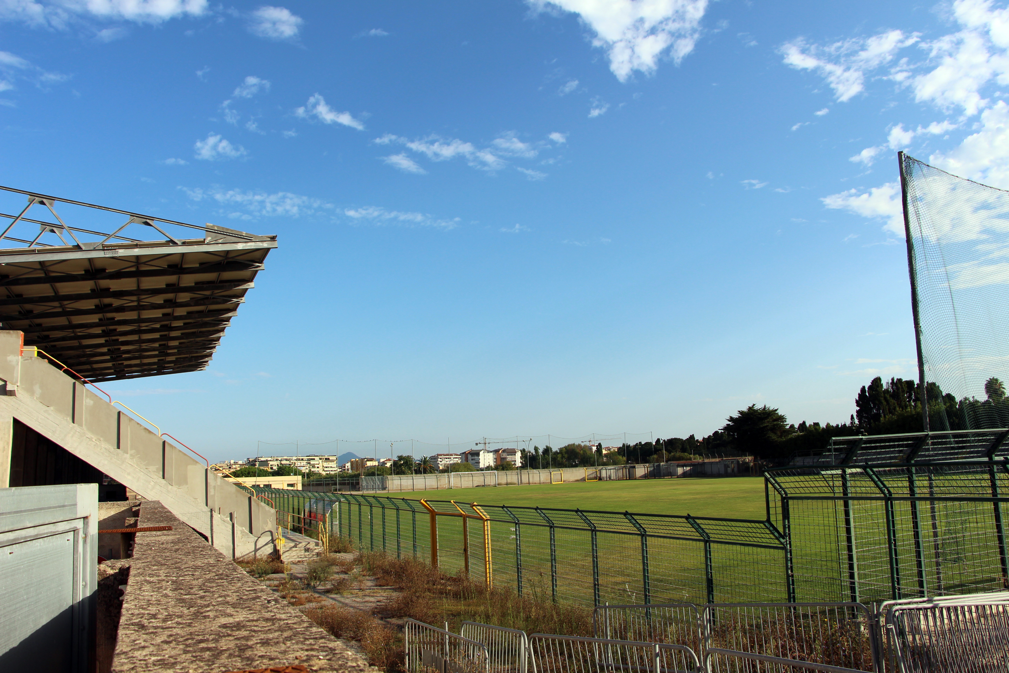 Alghero